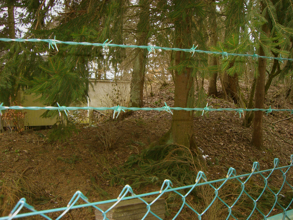 Burg Braunshorn, Sicht von Nordosten50°5′27.6″N 7°30′53.7″E / 50.091°N 7.514917°E